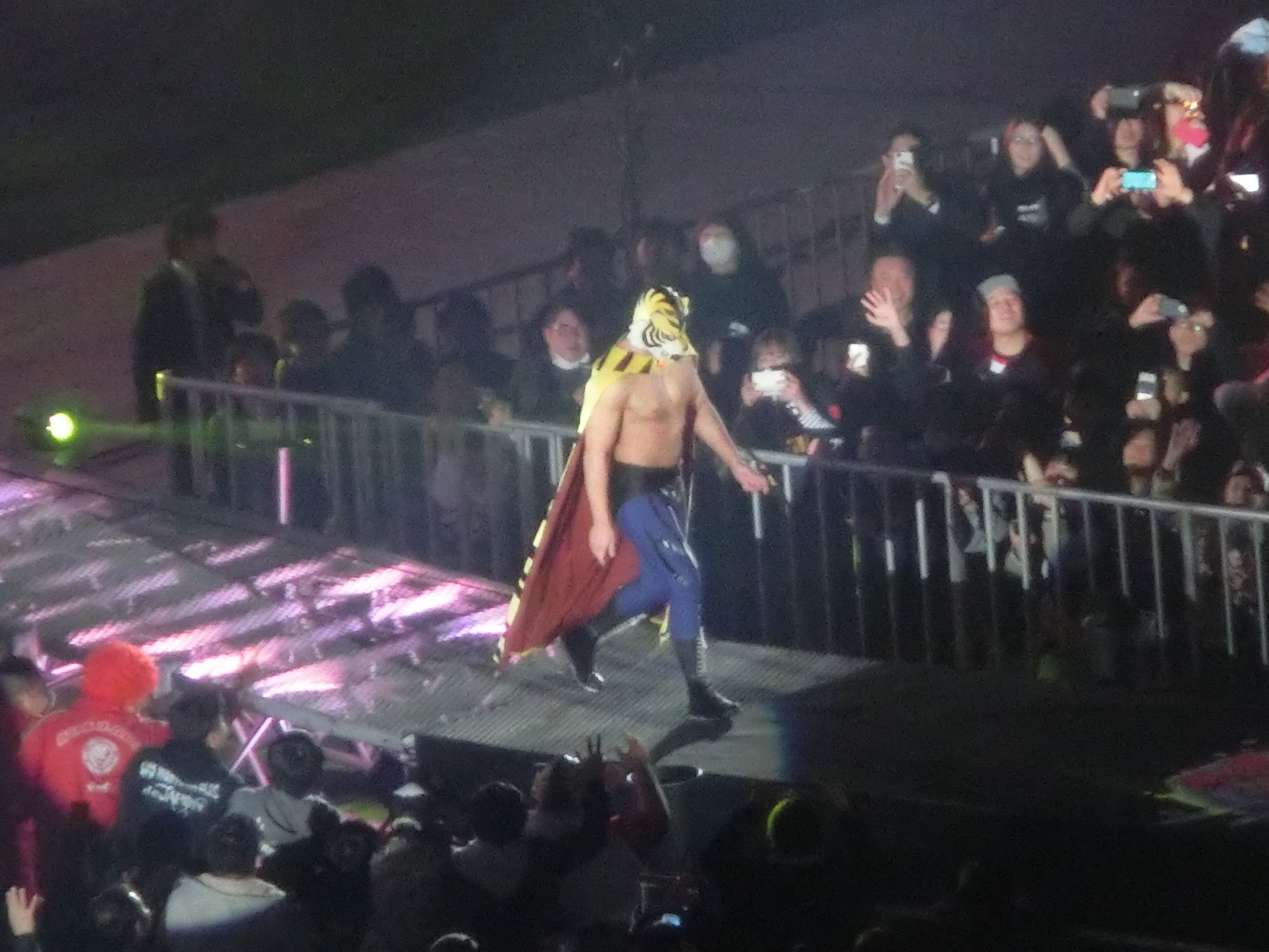 2017年1月4日東京ドーム タイガーーマスクW